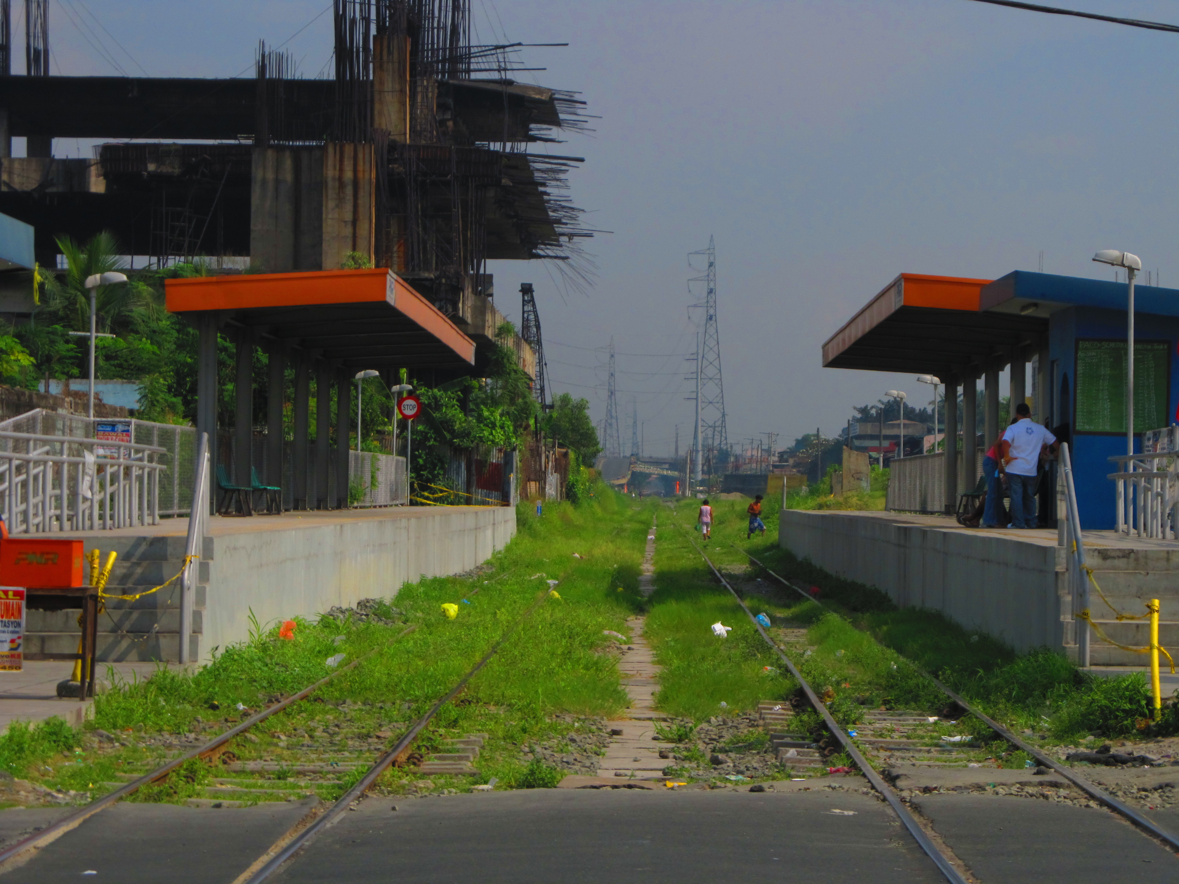 Old Paco railway station in Manila, Philippines